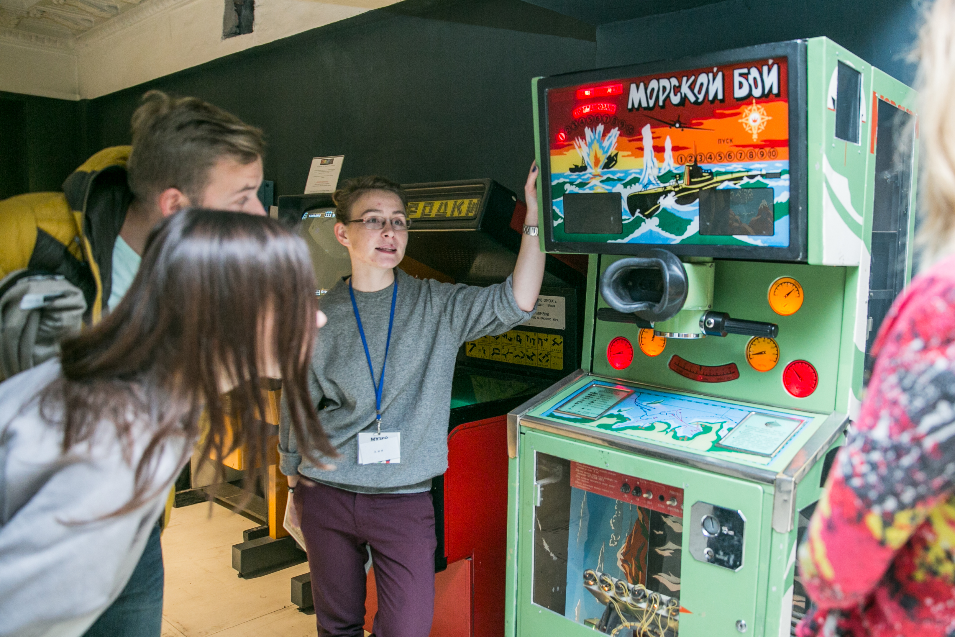 Посетители Музея советских игровых автоматов в Москве рядом с автоматом «Морской бой»